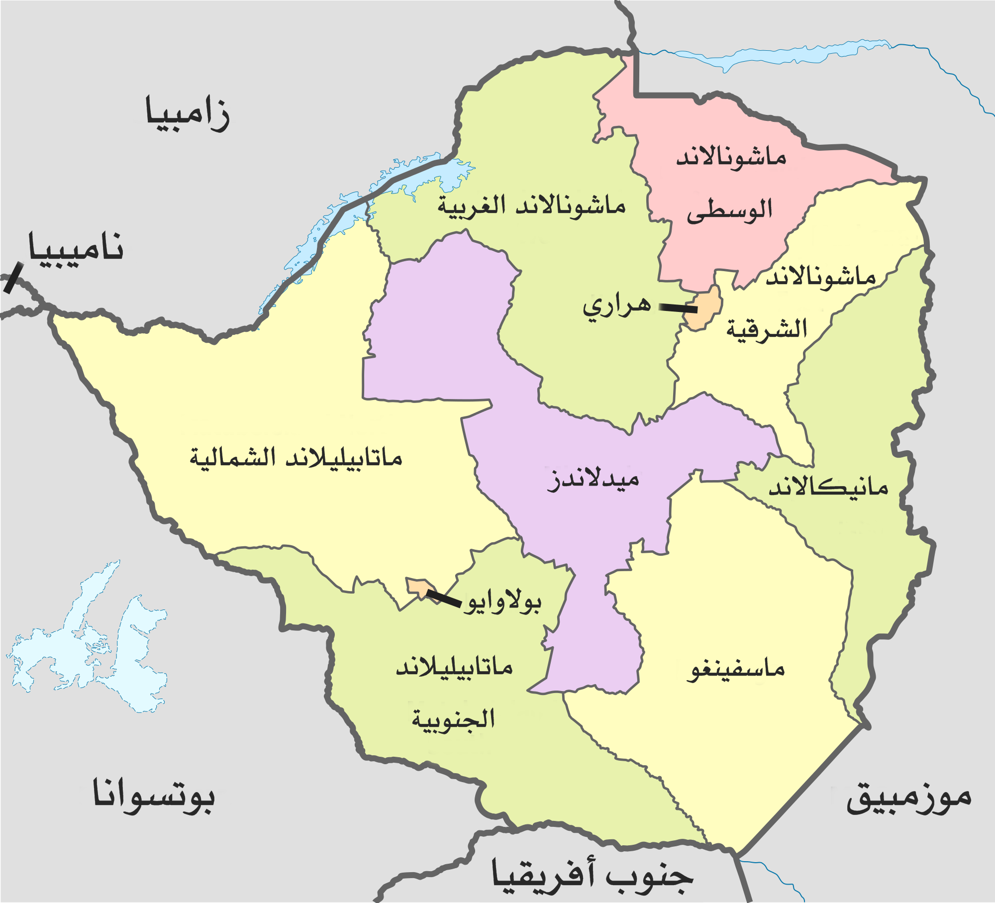 خريطة مقاطعات زيمبابوي